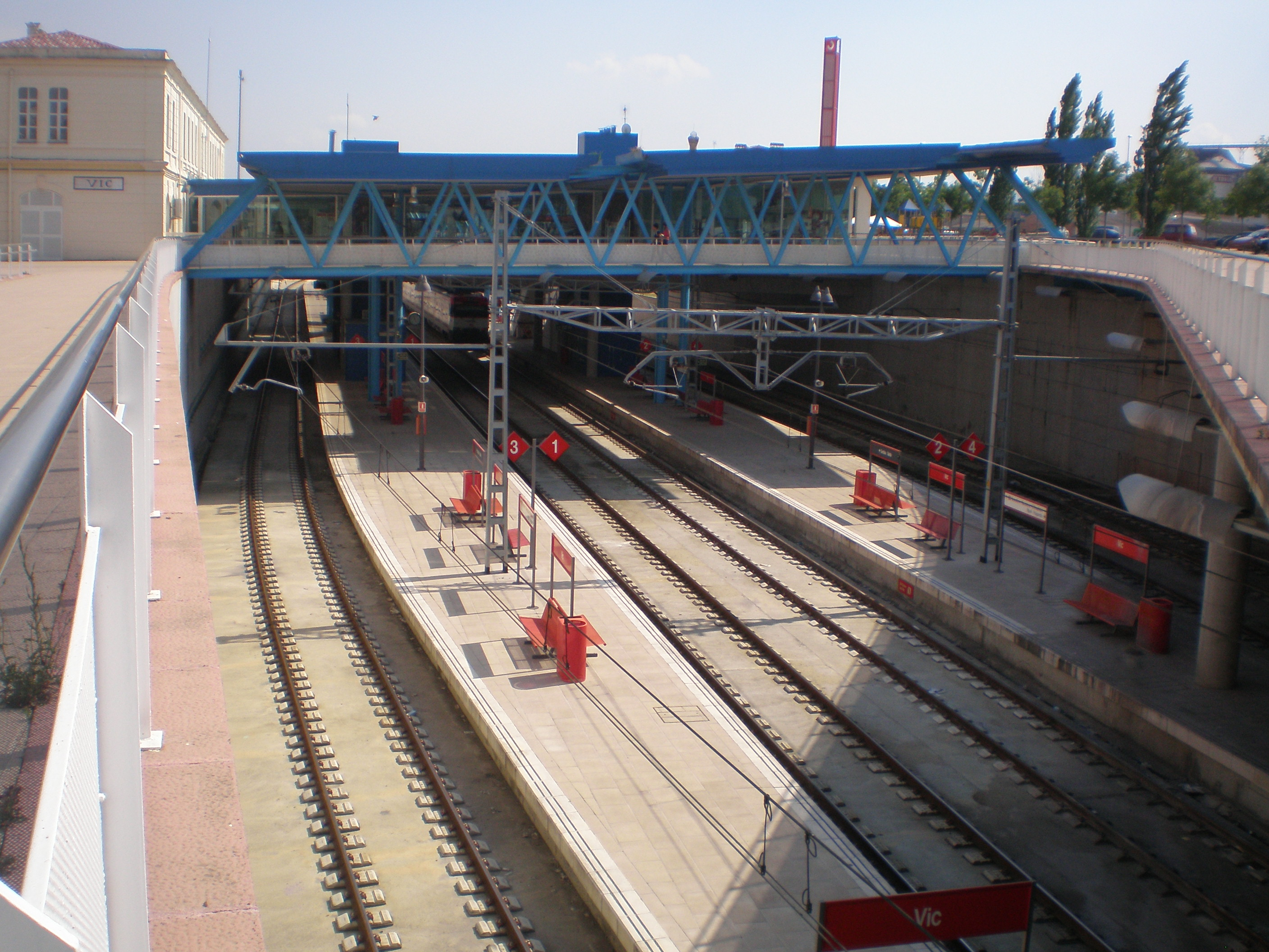 Estació de Vic des de la superfície, enfocant cap al nivell d'andanes.